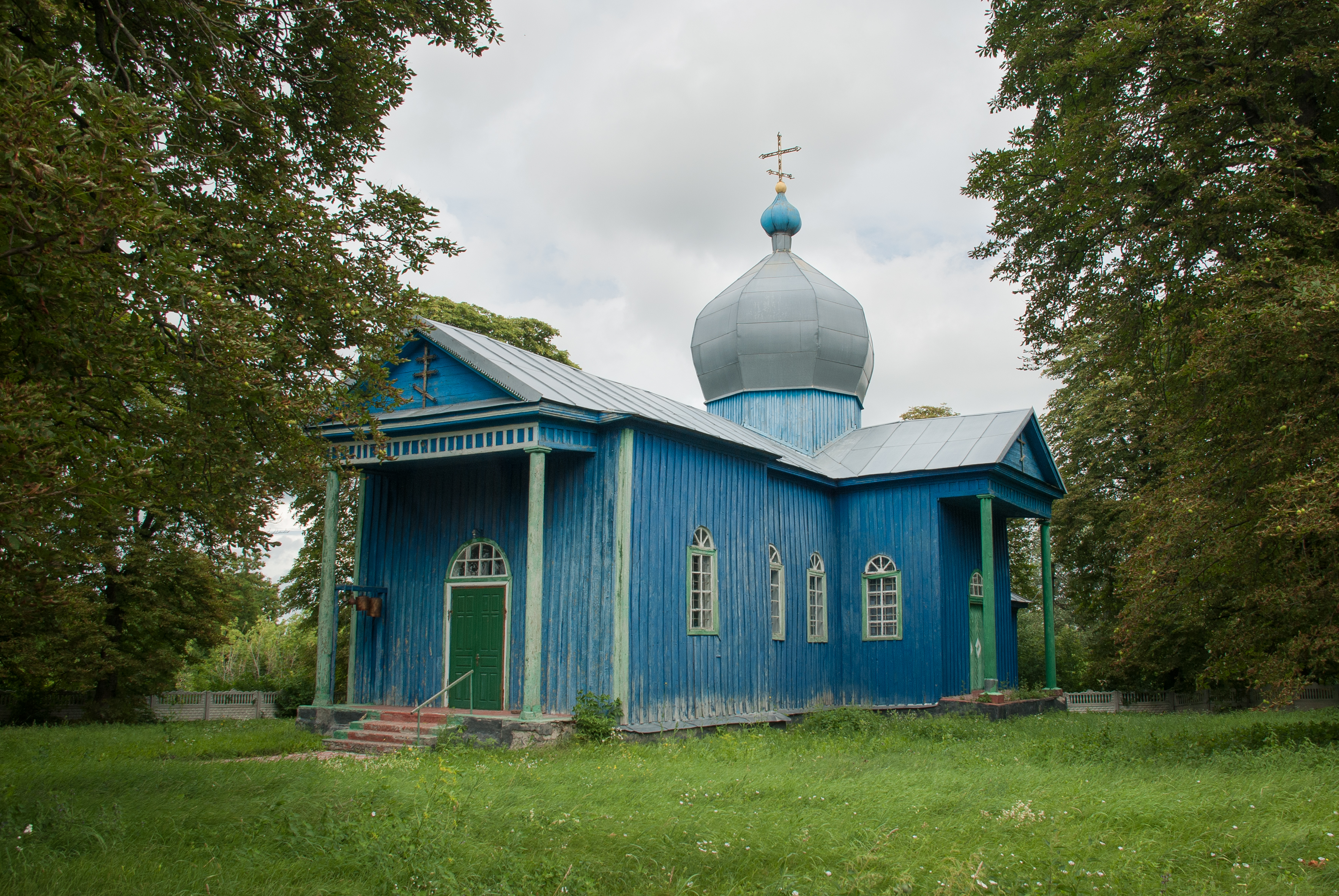 Покровський храм ПЦУ в Блажіївці